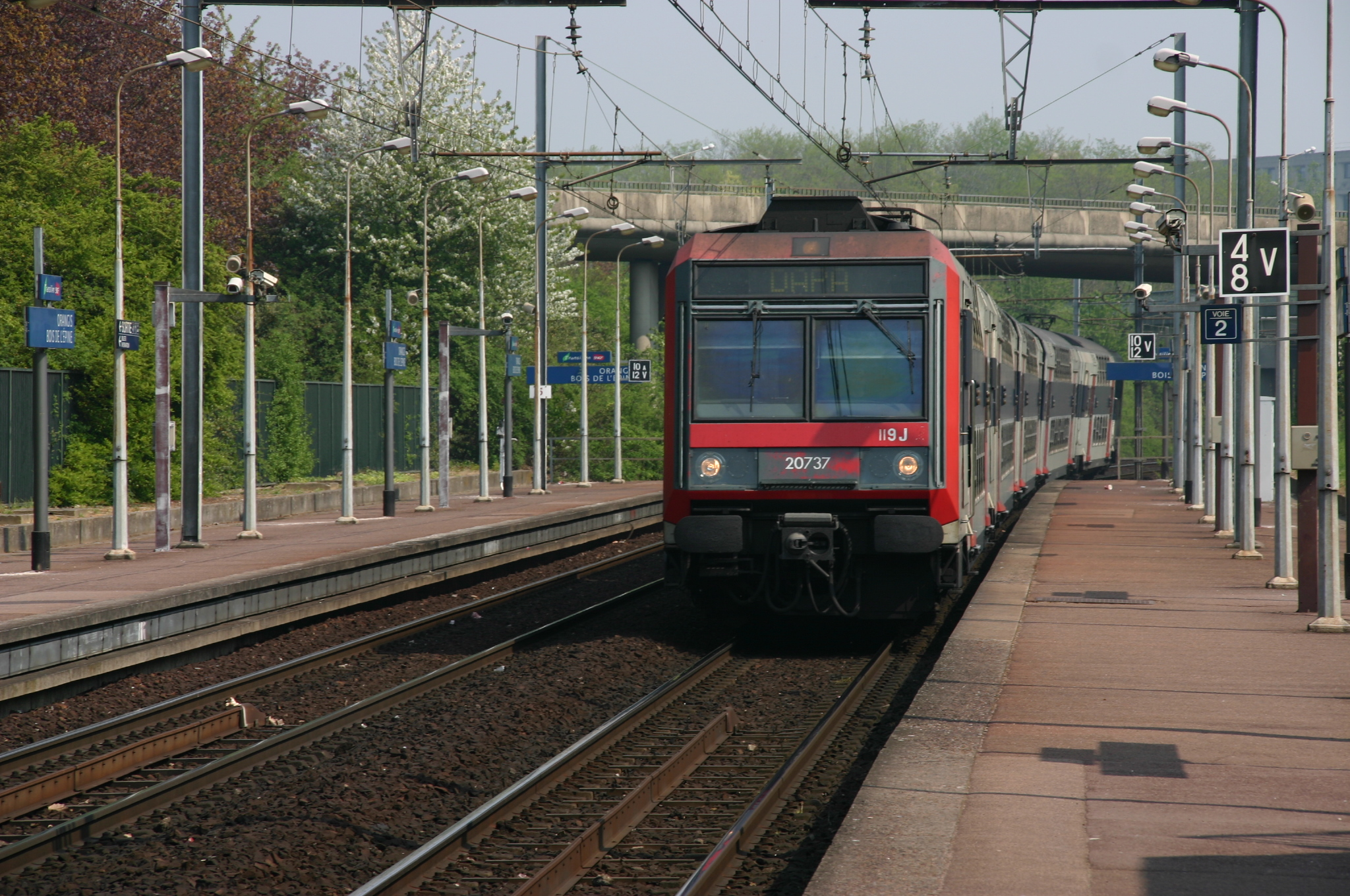 Gare d'Orangis-Bois-De-L'Epine , Ris-Orangis, département de l'Essonne, France